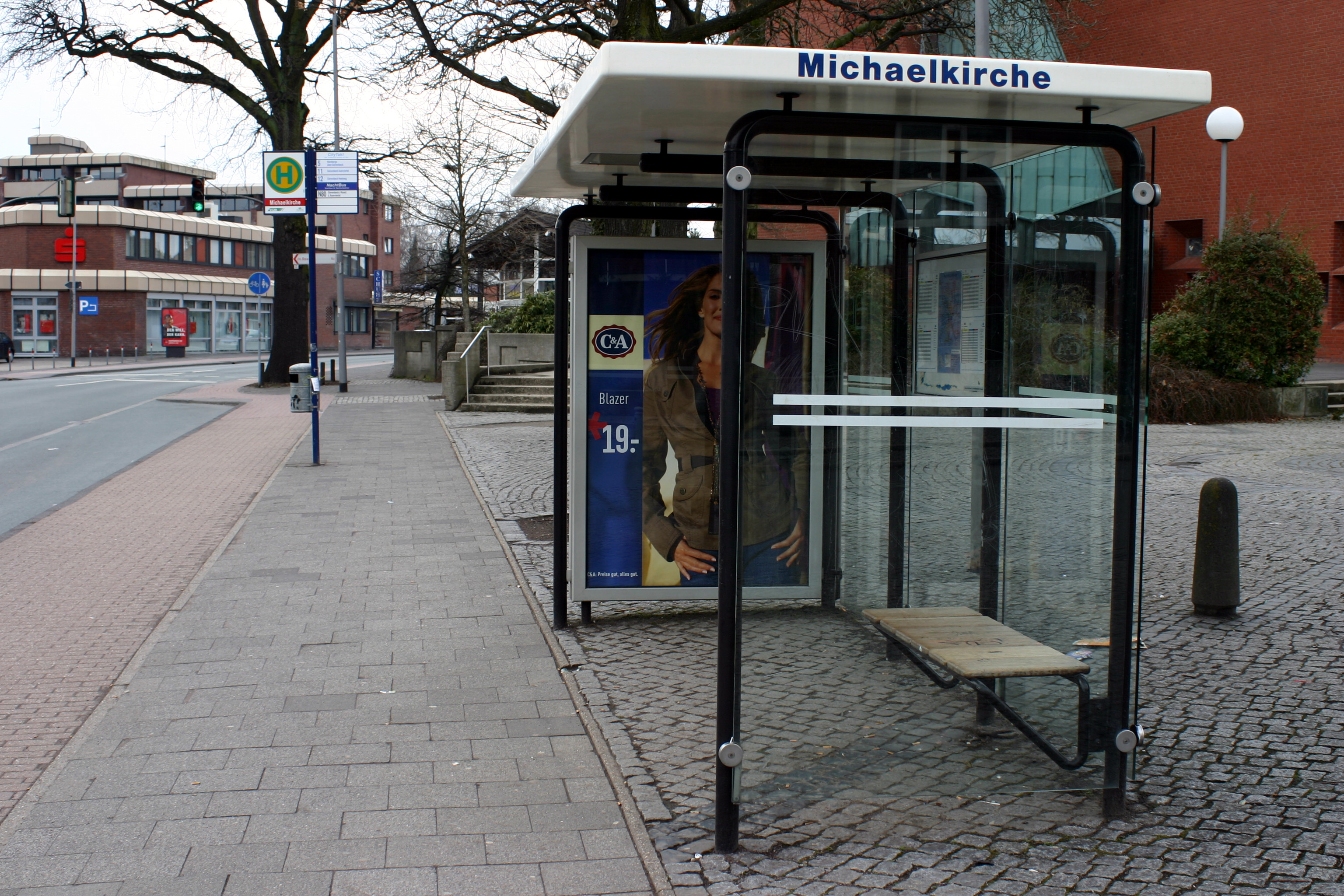 Münster Gievenbeck, Bushaltestele Michaelkirche